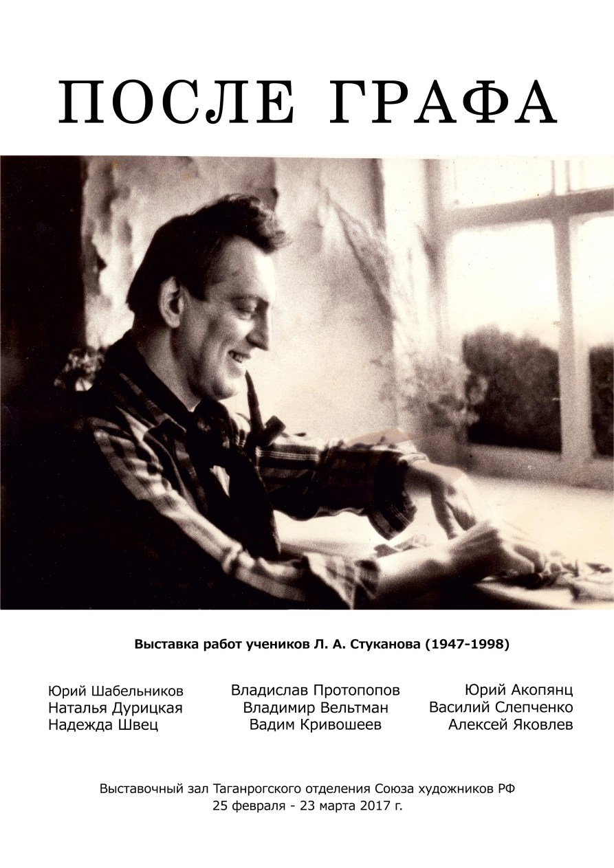 Постер выставки После Графа, Таганрог, 2017.